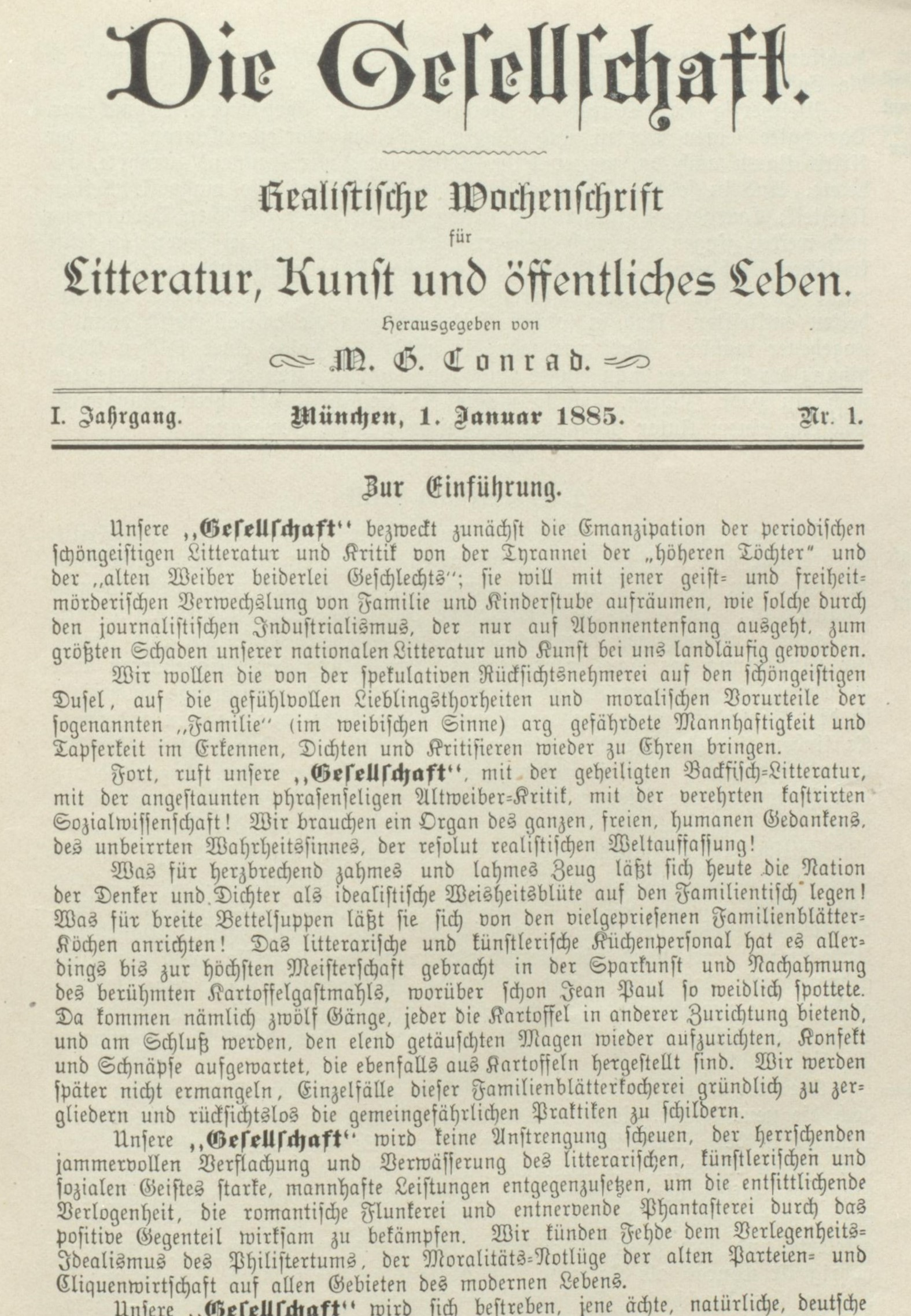 Die Gesellschaft Erstausgabe 1. Januar 1885 Die Gesellschaft (Literaturzeitschrift)